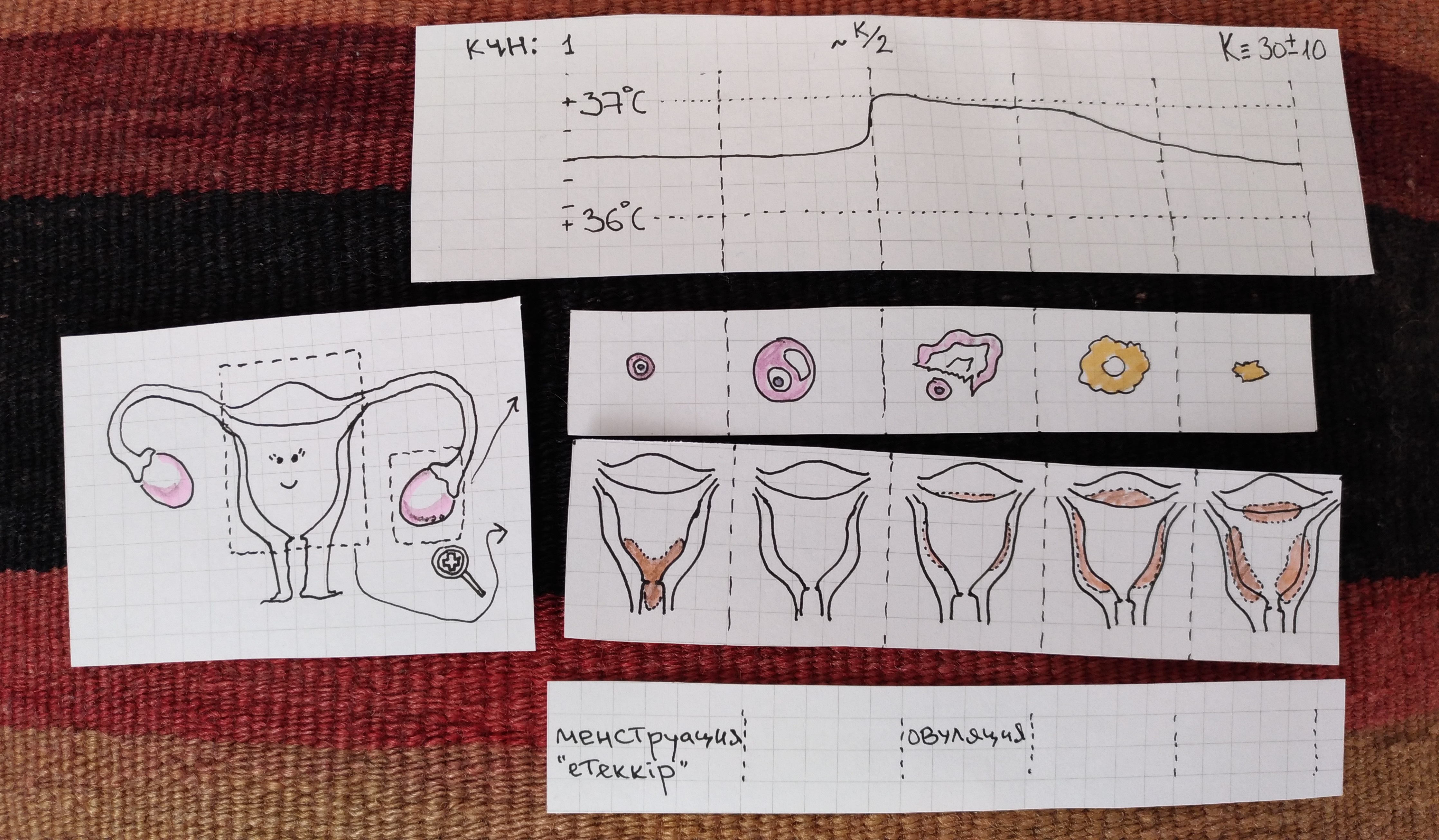 Етеккір циклі